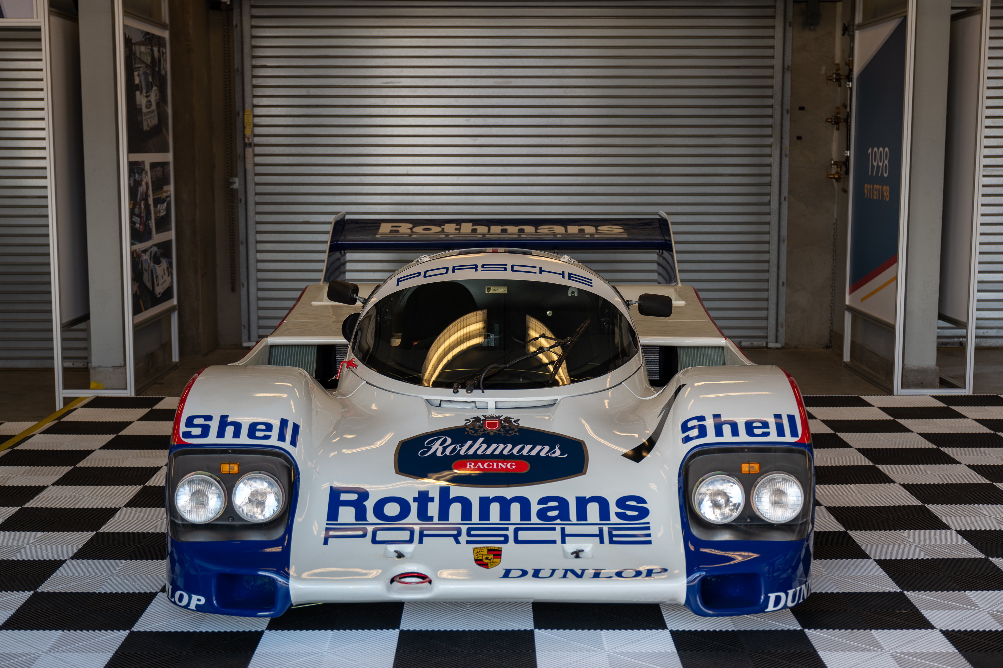 Rennsport Reunion VI